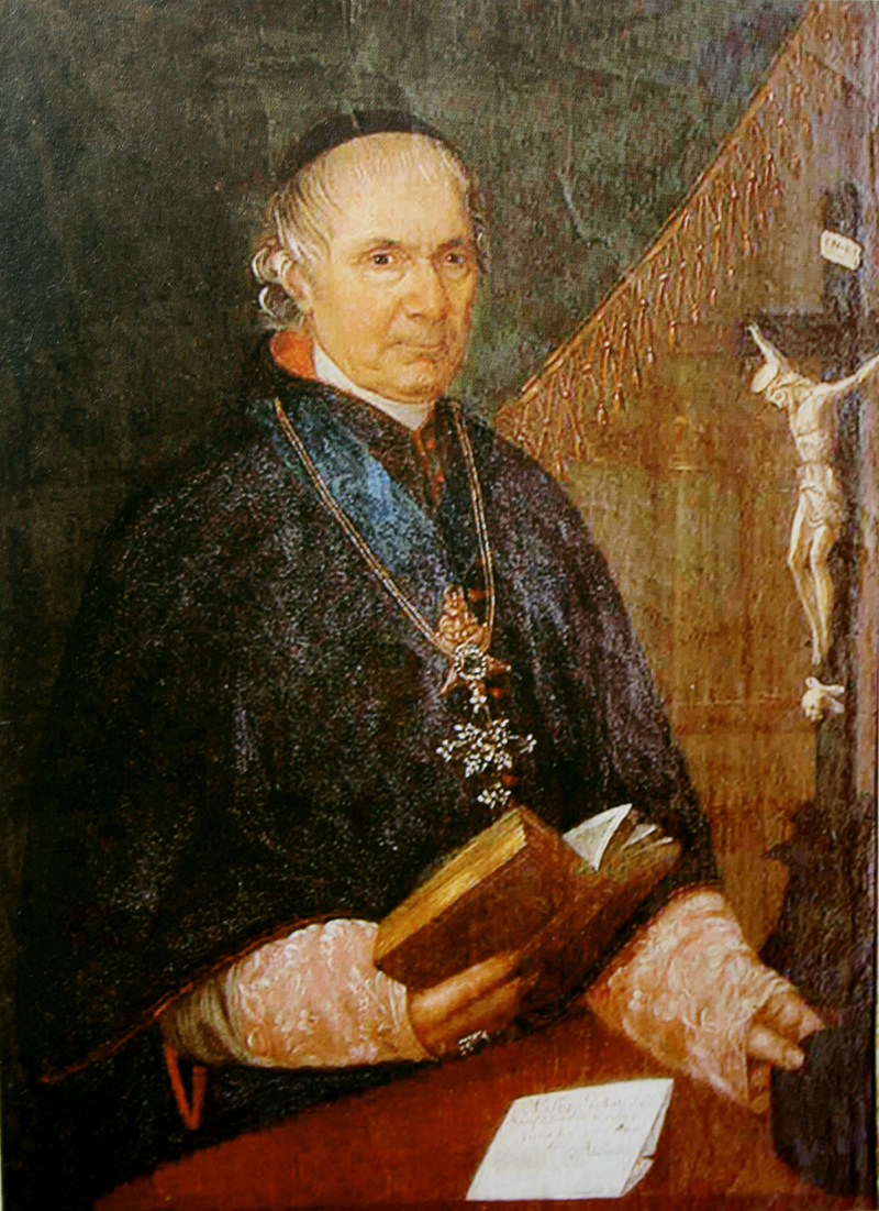 olio su tela che ritrae mons. Gioacchino de Gemmis